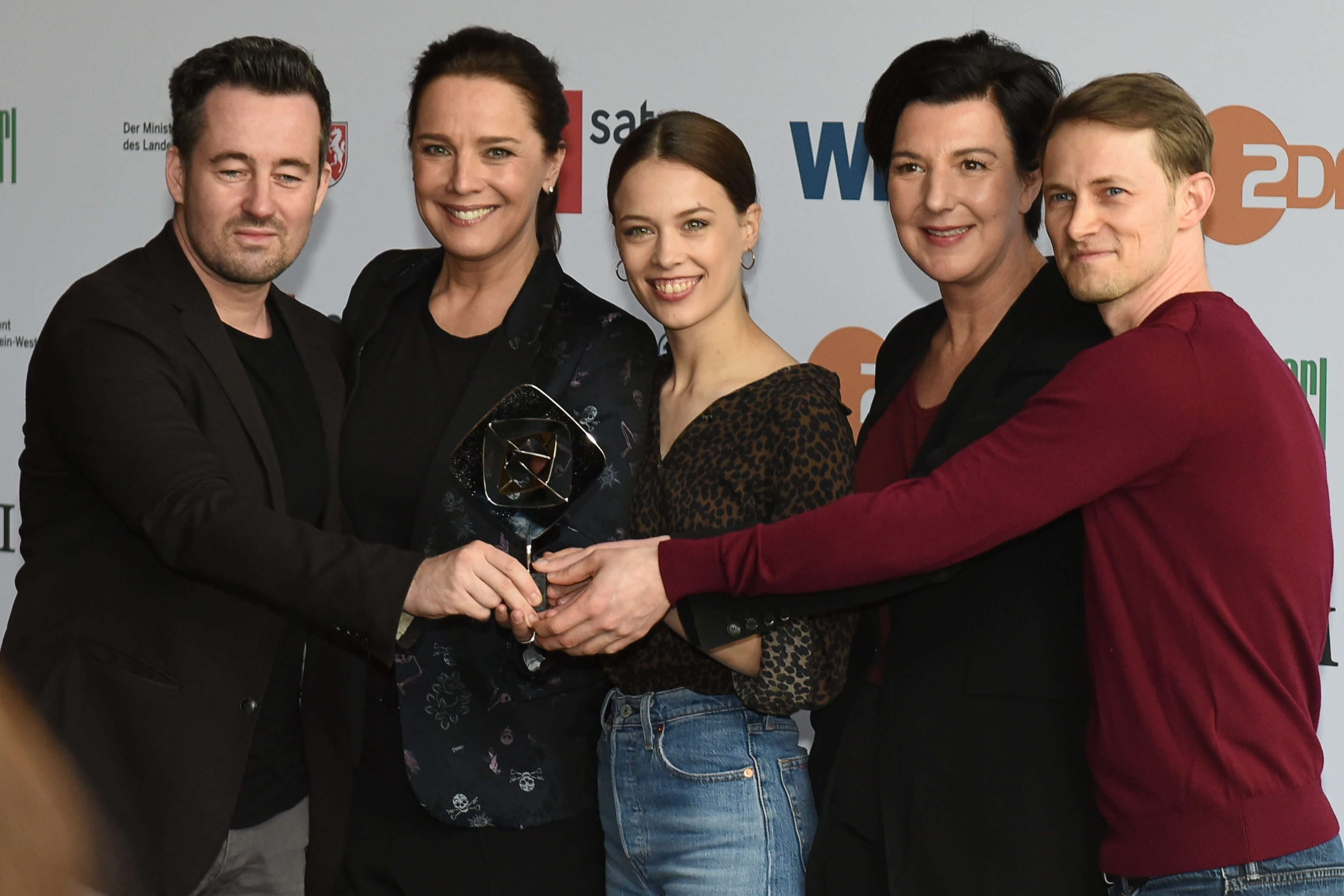 Verleihung des Grimme-Preises 2019.